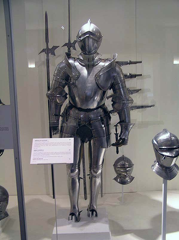 Armure du Chevalier Bayard, Musée de l'Armée, Hôtel des Invalides (Paris)